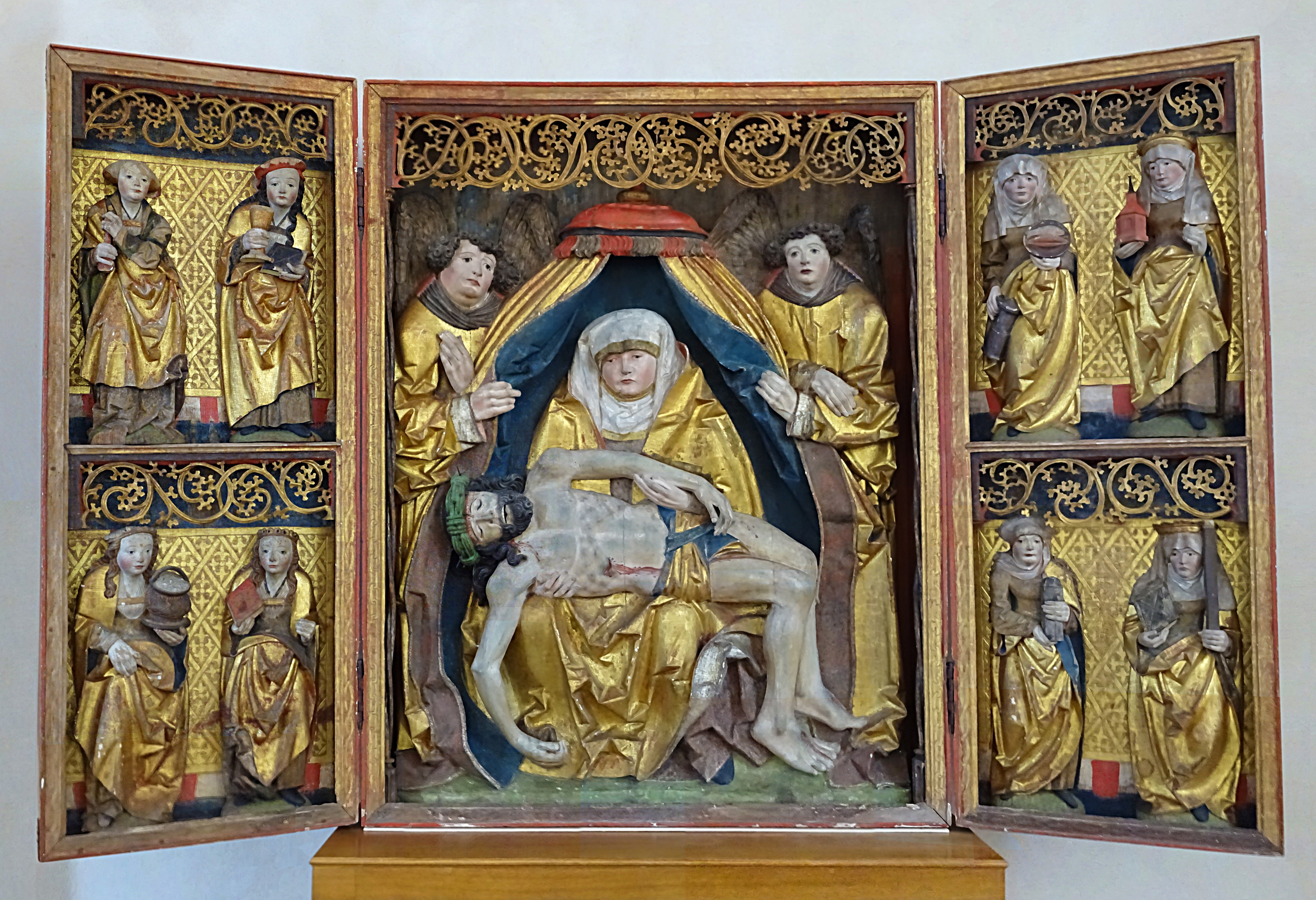 Pieta Altar (1519) in der Kirche St. Simon und Juda (Neunhofen)